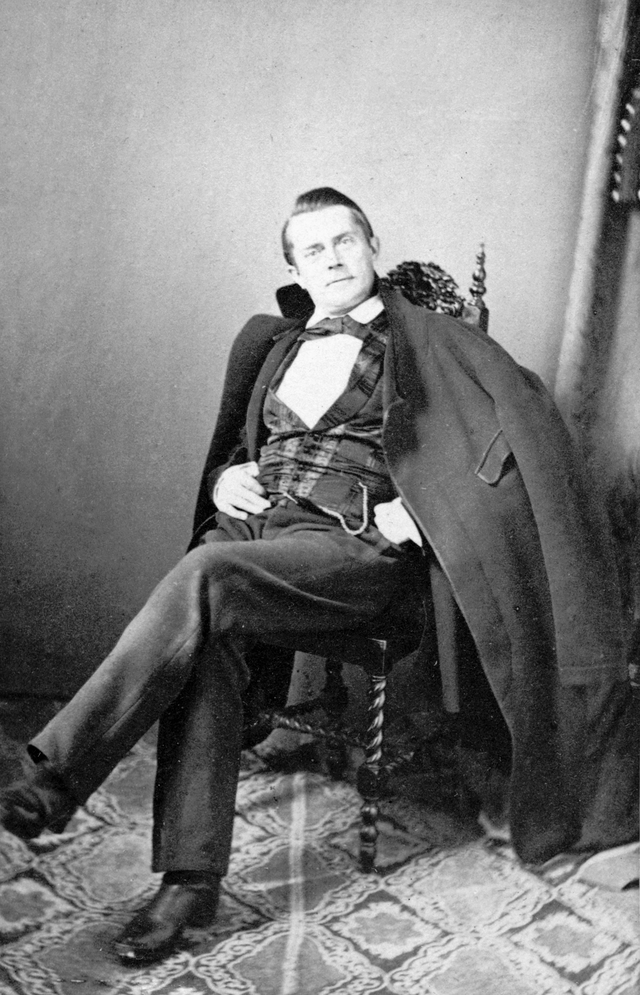 Robert Gustaf Broman, skådespelare vid Kungliga Dramatiska teatern 1862